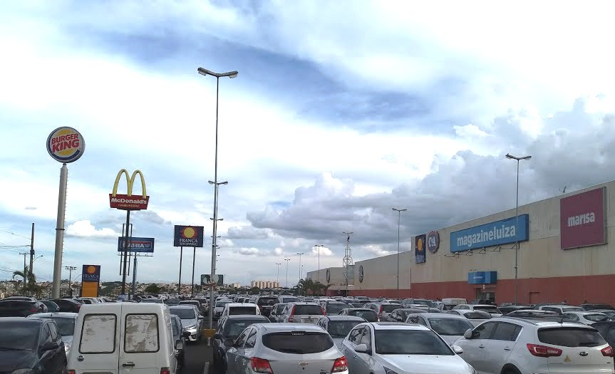 Franca Shopping, Franca (SP), Brasil